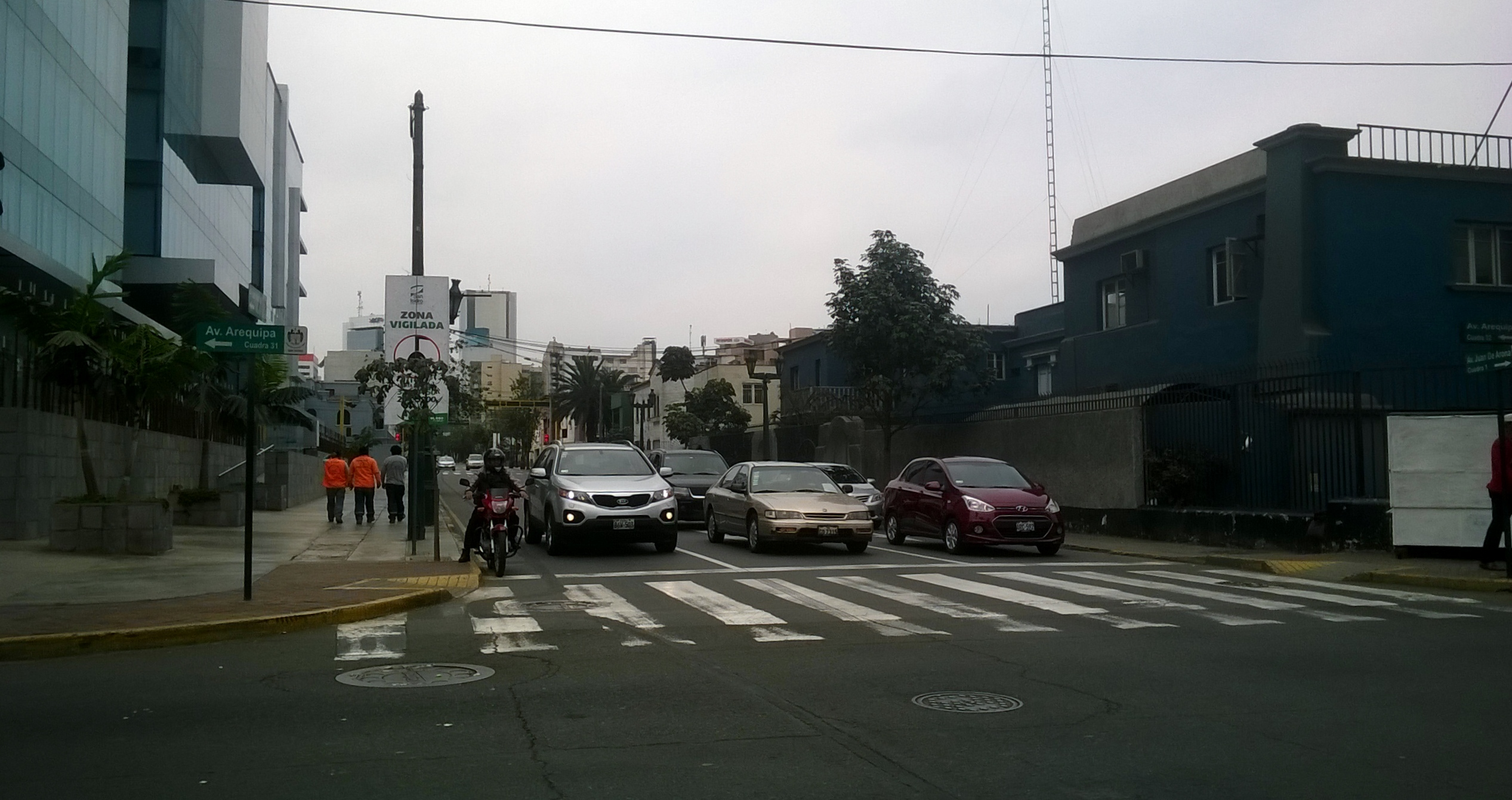 La avenida Juan de Arona en San Isidro.